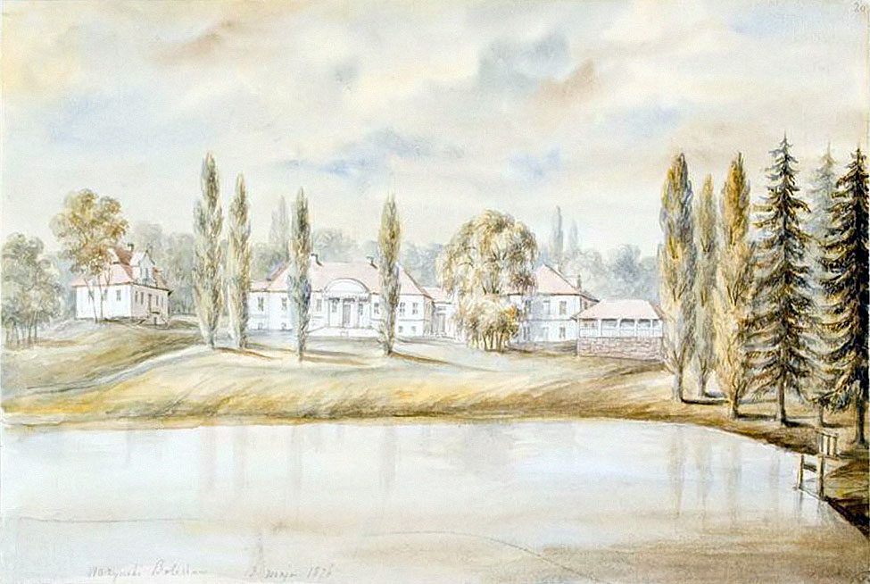 Беларуская (тарашкевіца): Ішчална (Iščałna), сядзіба Ласковічаў (Łaskovič)